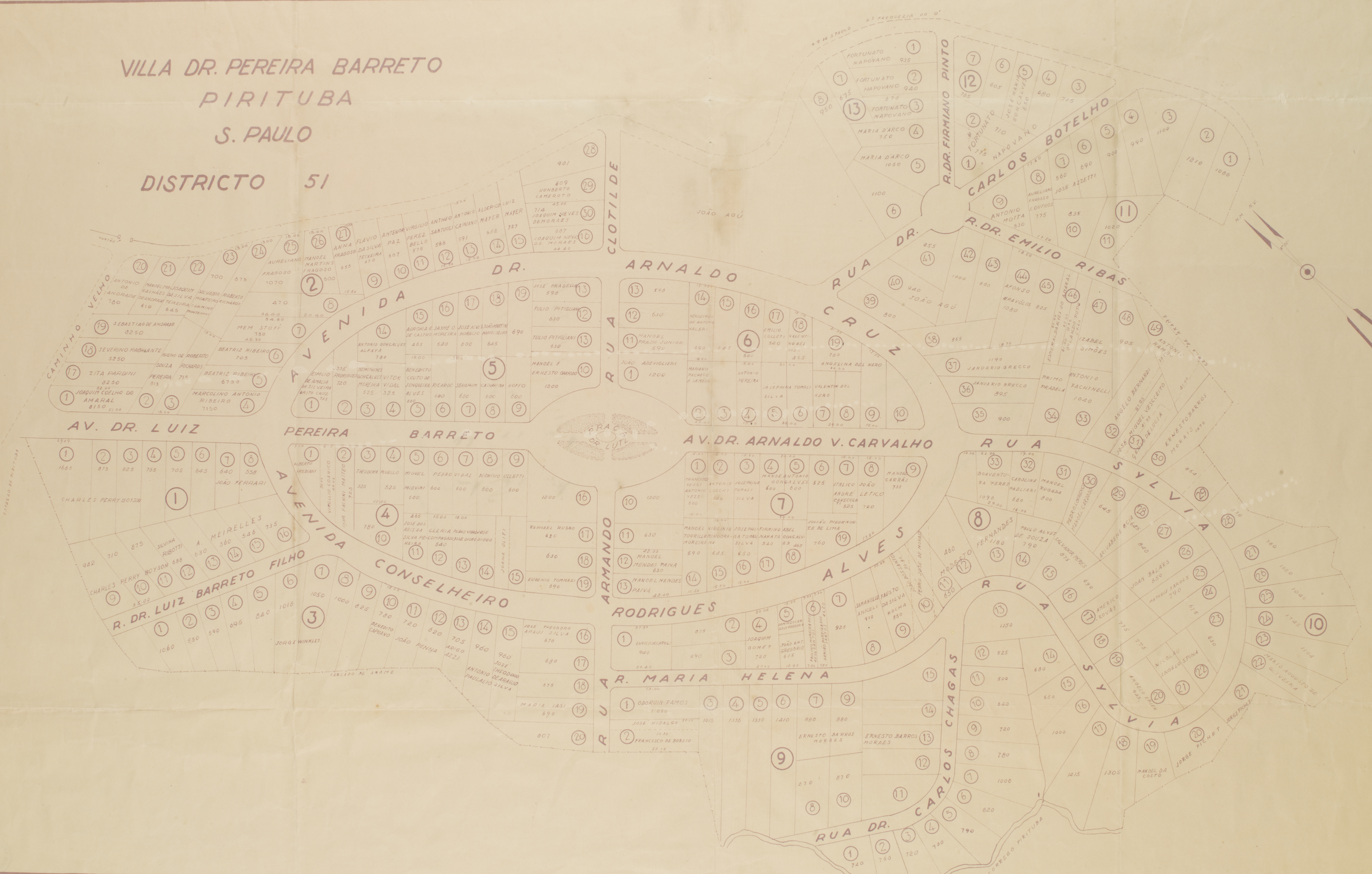 Obra que integra o acervo do Museu Paulista da USP. Coleção João Baptista de Campos Aguirra